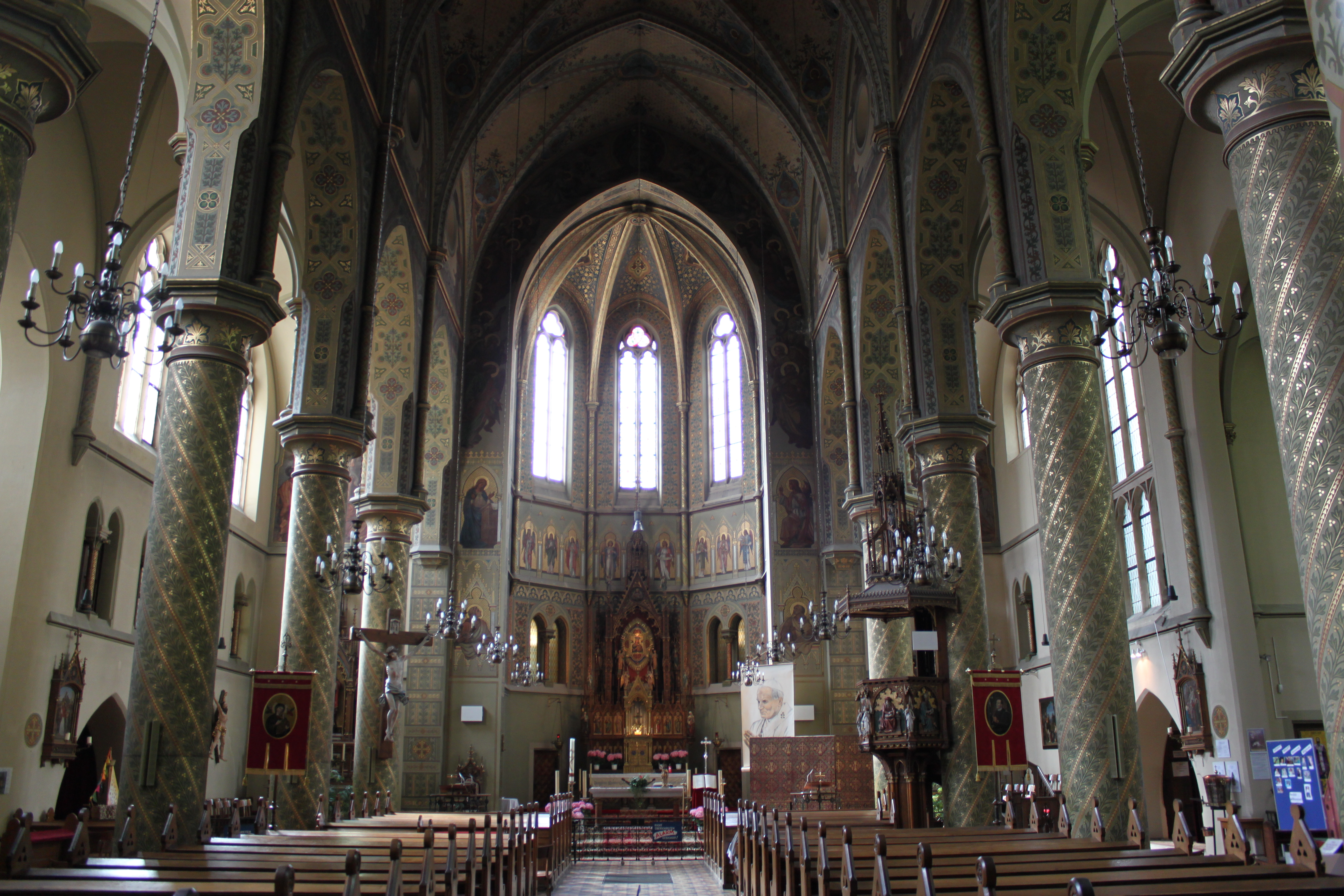 Innenraum der Redemptoristenkirche (Marienkirche) in Wien-Hernals